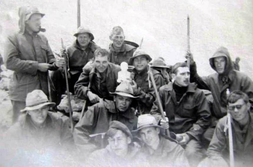 Последнее восхождение на Шах-Даг с бюстом В.И. Ленина, который был водружен на вершине, 1968 г.».